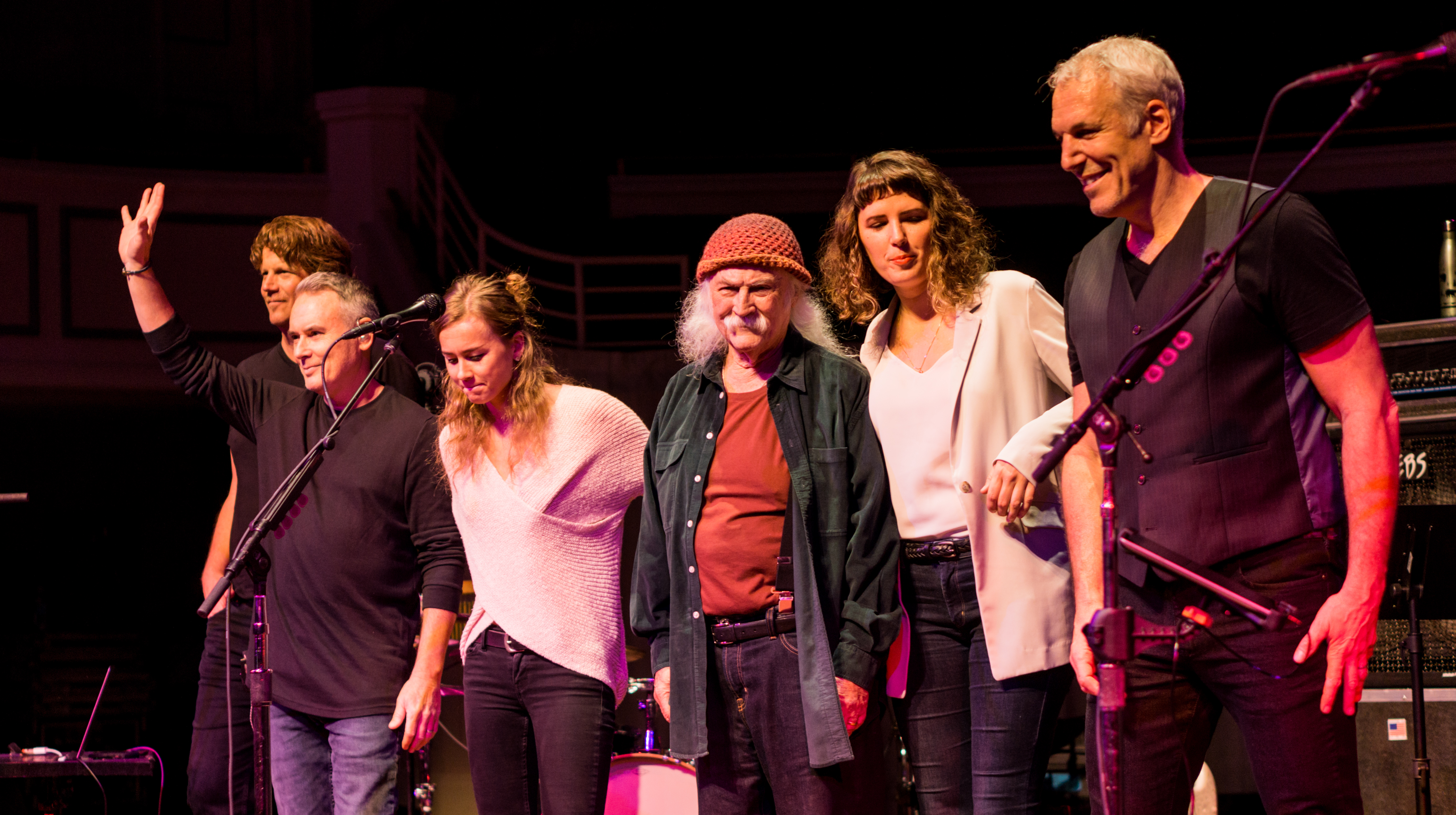 DavidCrosbyCarmel041117-34